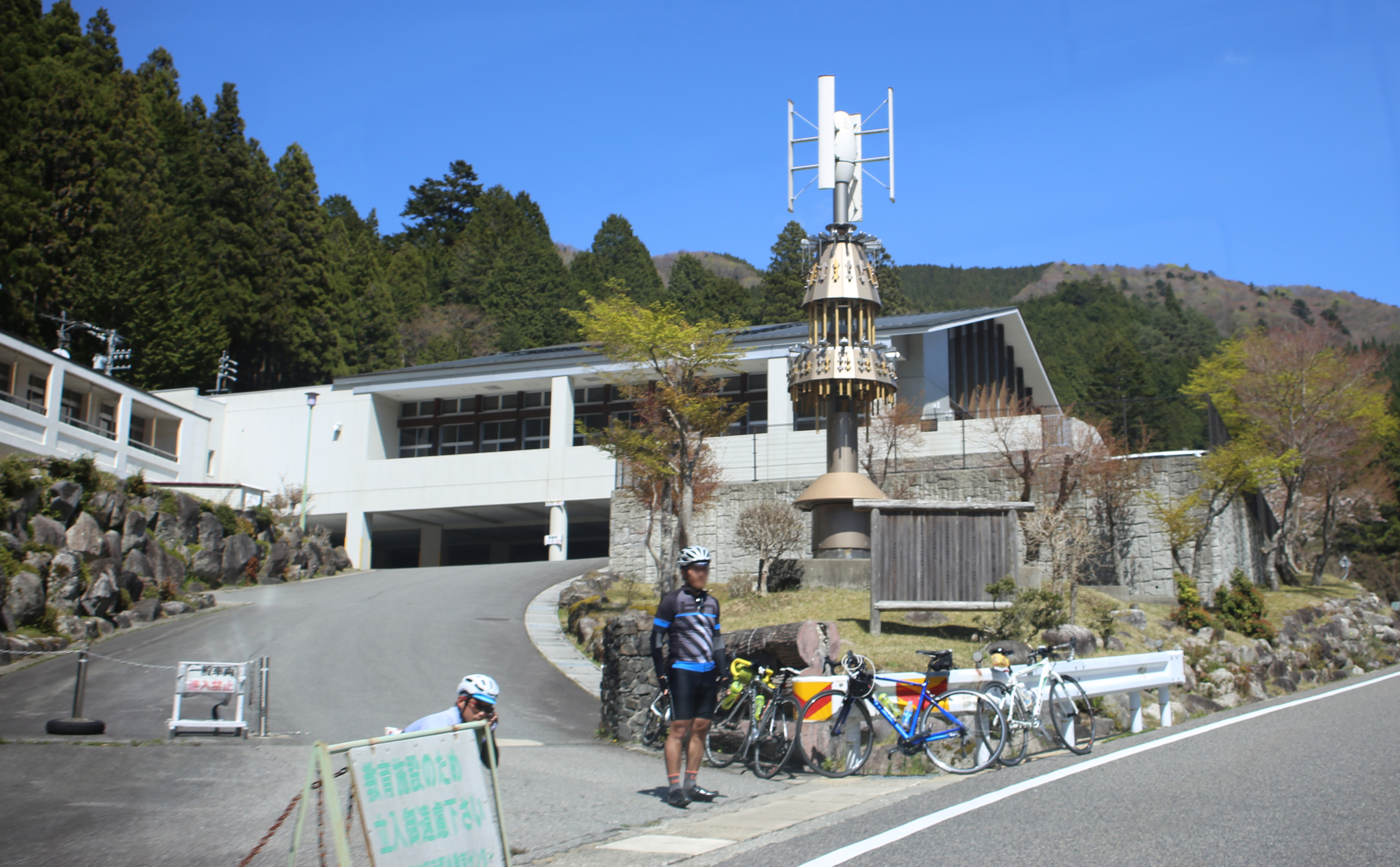 愛知県豊田市稲武町井山の名古屋市稲武野外教育センター 第一本館。モニュメントは愛知万博名古屋市パビリオンに展示されていたもの。 中央の人物につきぼかし処理およびトリミング処理済。